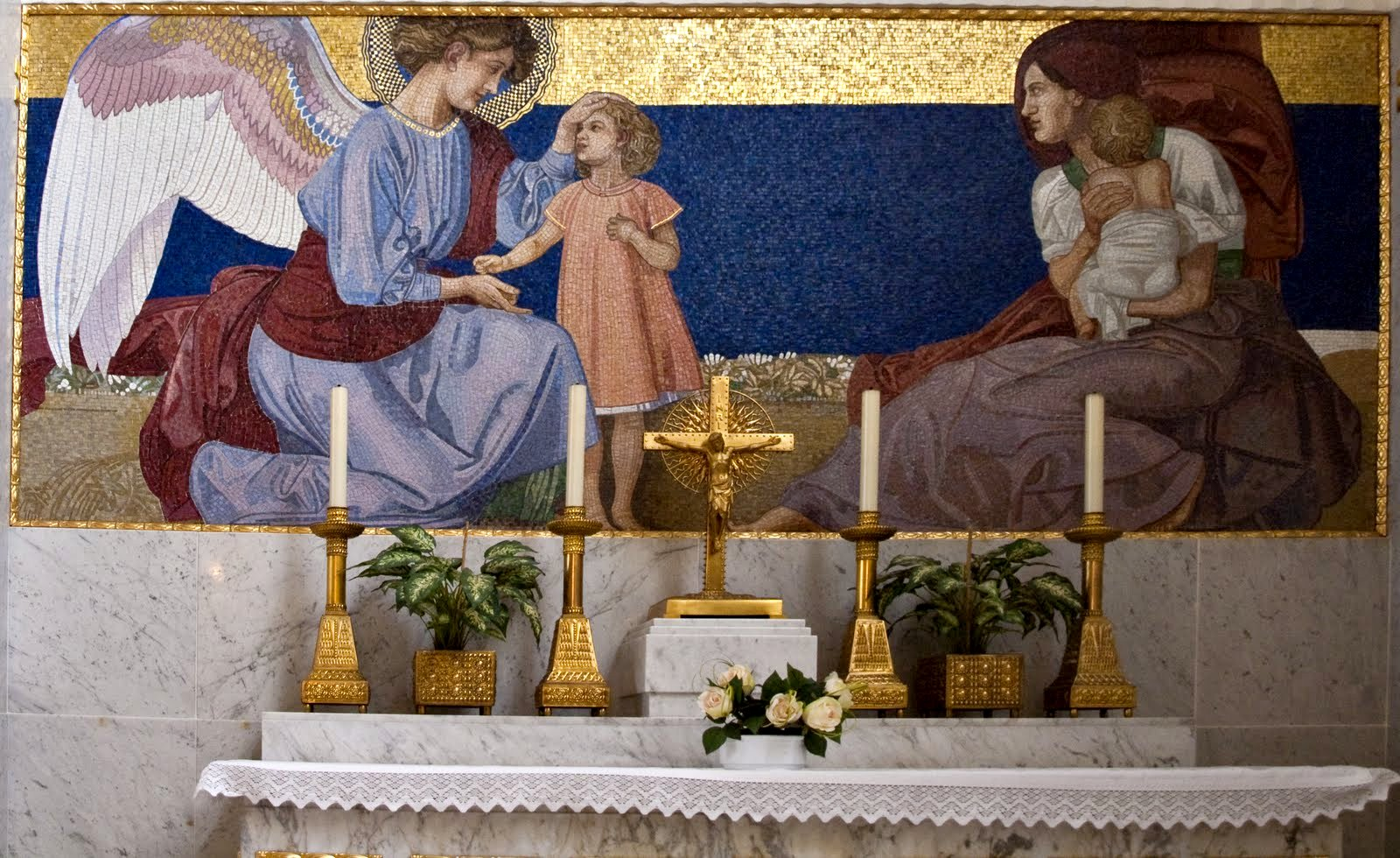 Steinhof Kirche Rechter seitenaltar